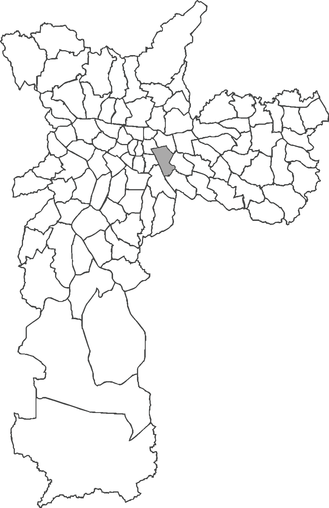 Localização do distrito da Mooca no município de São Paulo.